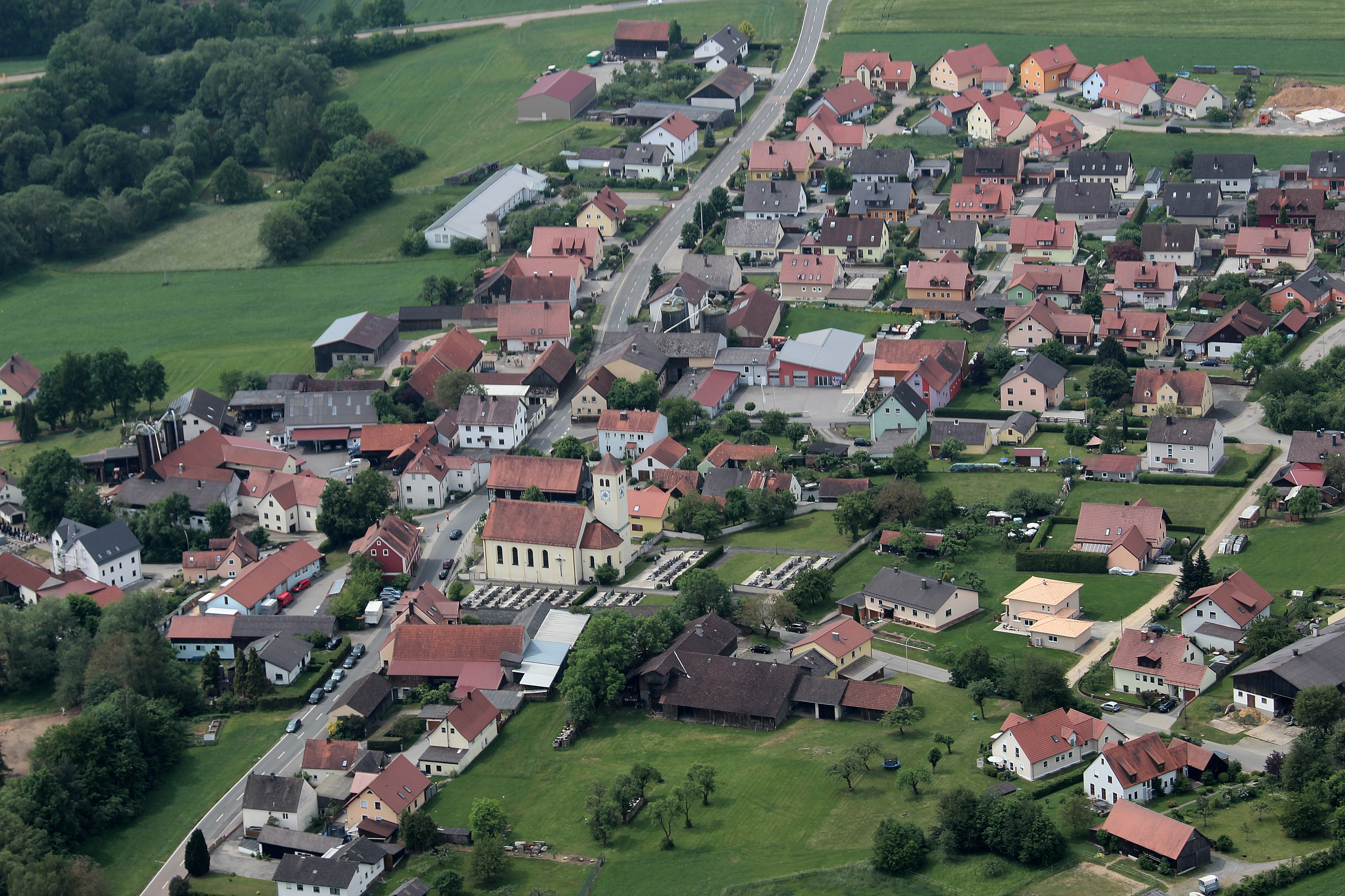 Weihern, Stadt Pfreimd, Landkreis Schwandorf, Oberpfalz, Bayern